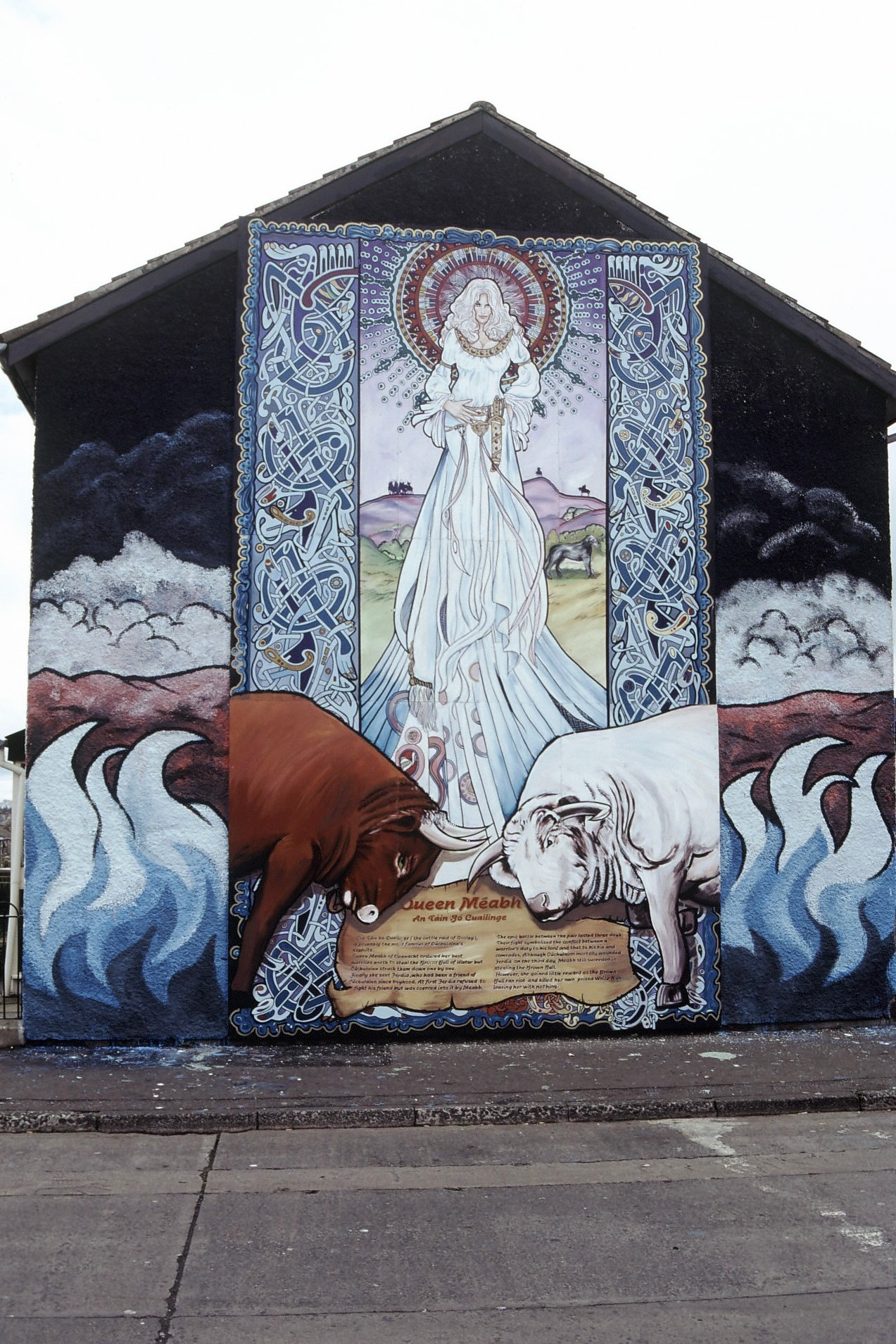 Ardoyne, Belfast. Queen Maeve.